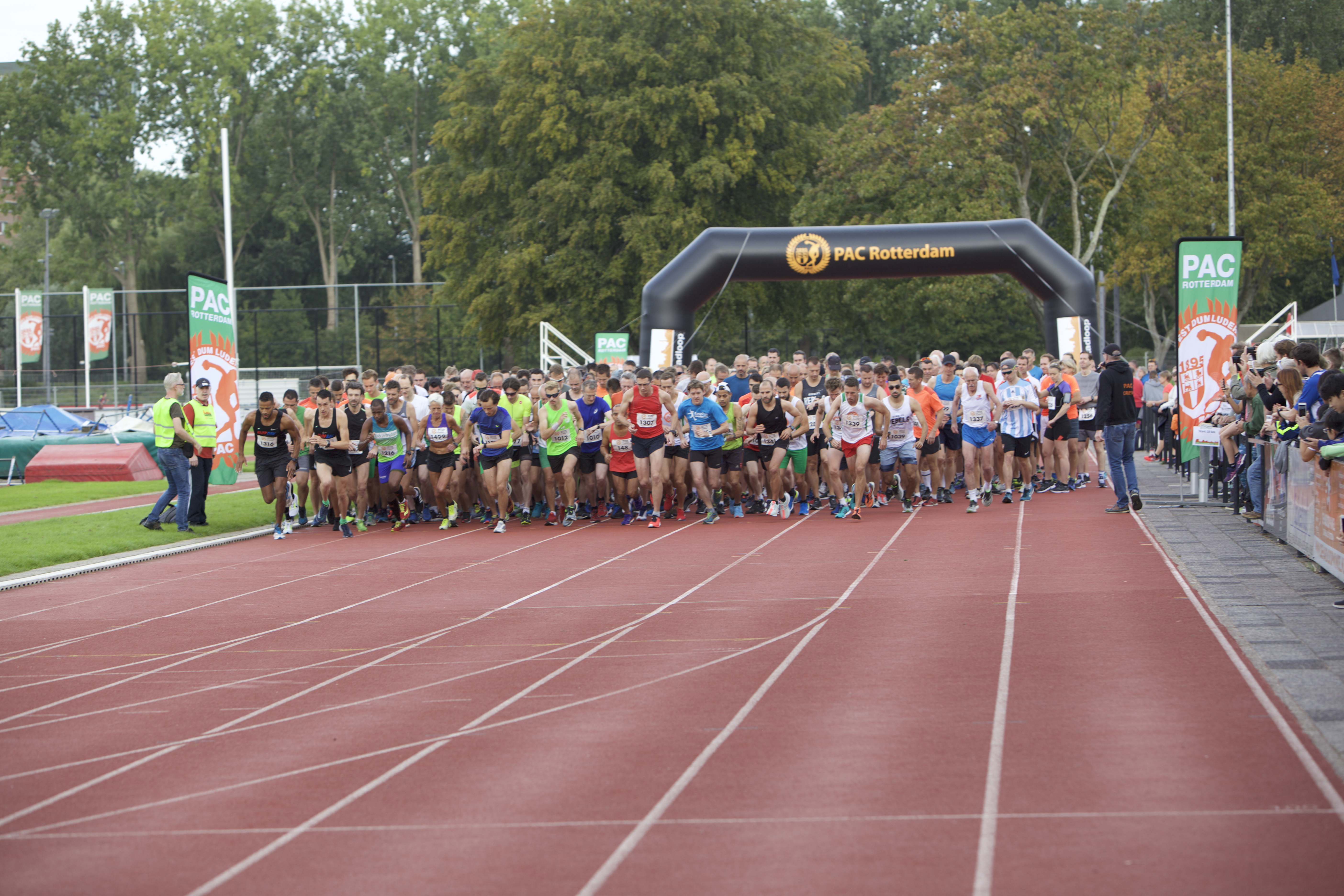 Maasstadloop 2018, Atletiekvereniging PAC, Rotterdam.